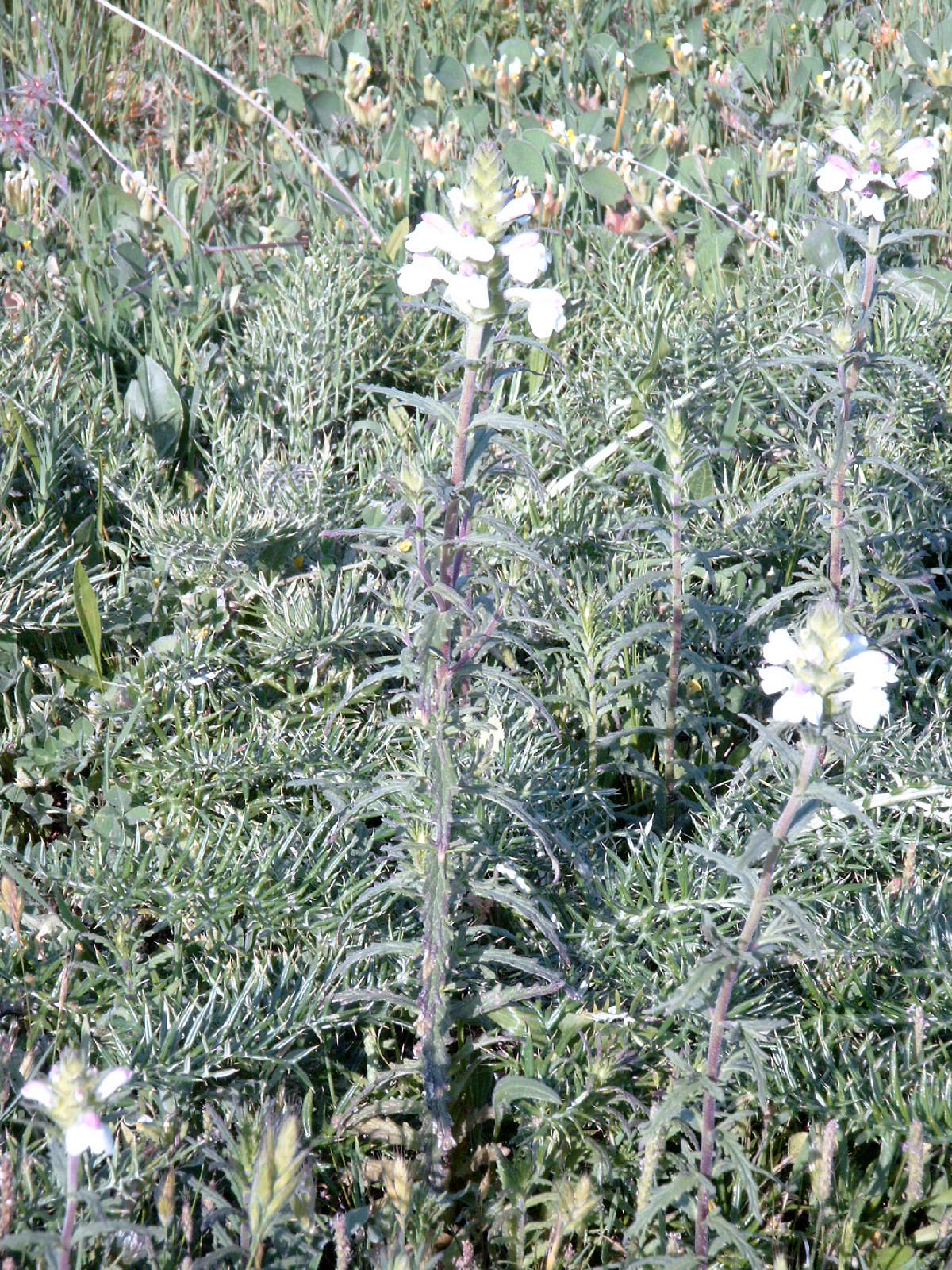 Species Bellardia trixago Familia Orobanchaceae